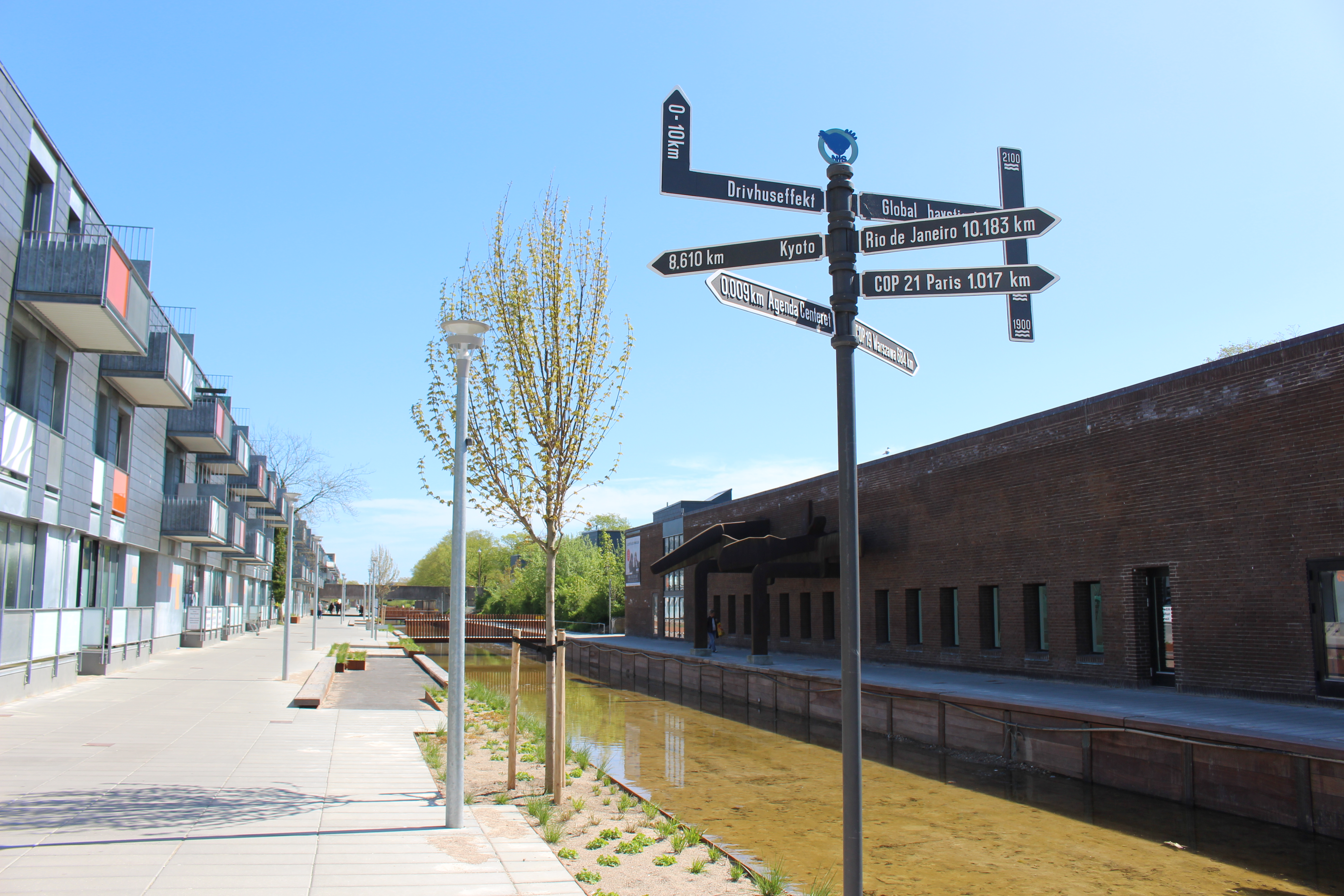 Albertslund Agenda Center klimaskilt